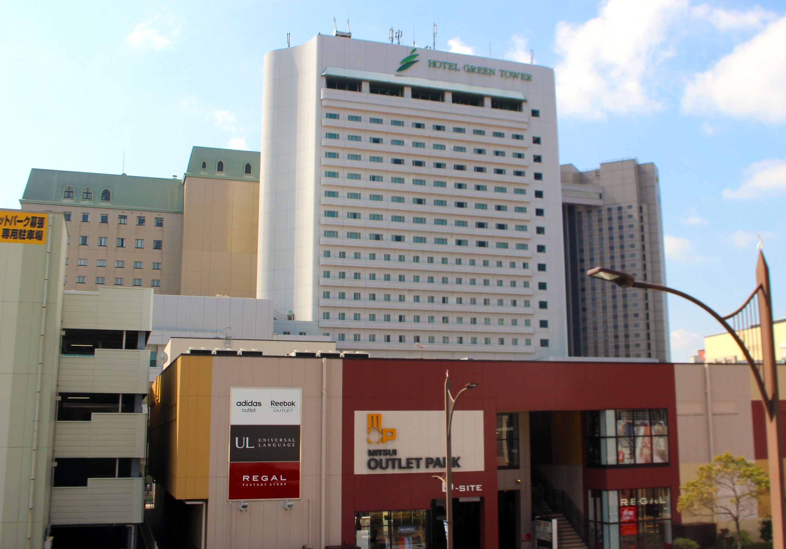 Hotel Green Tower Makuhari 外観（三井アウトレットモール側）